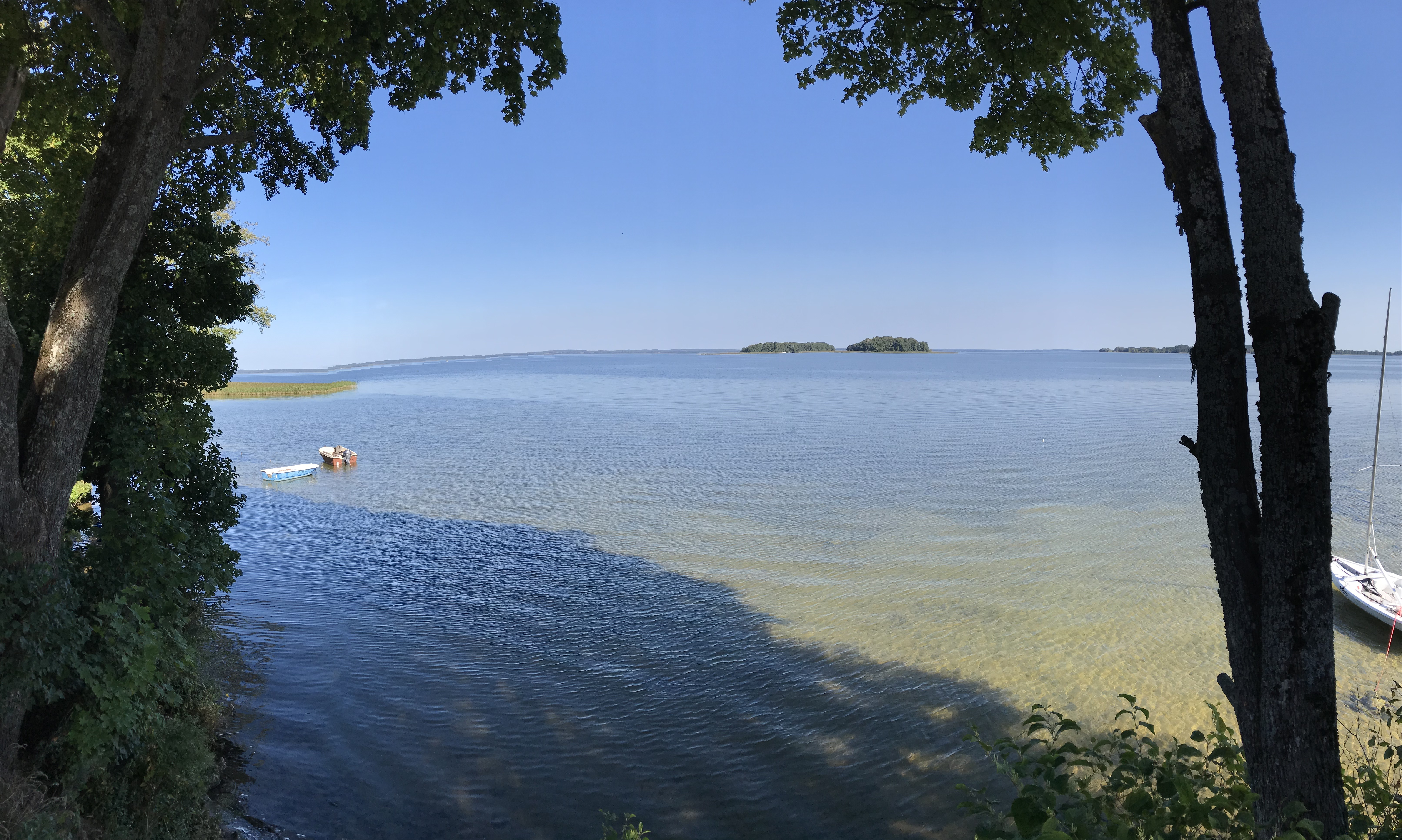 Jezioro Śniardwy w Niedźwiedzim Rogu